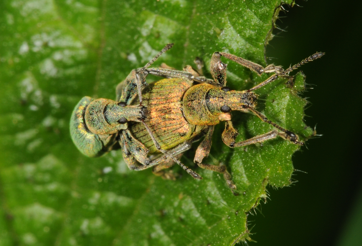 Phyllobius spec. vermutlich P. pomaceus, Pärchen auf Brennnessel, Steinau bei Schlüchtern, Main-Kinzig-Kreis, Hessen, Deutschland